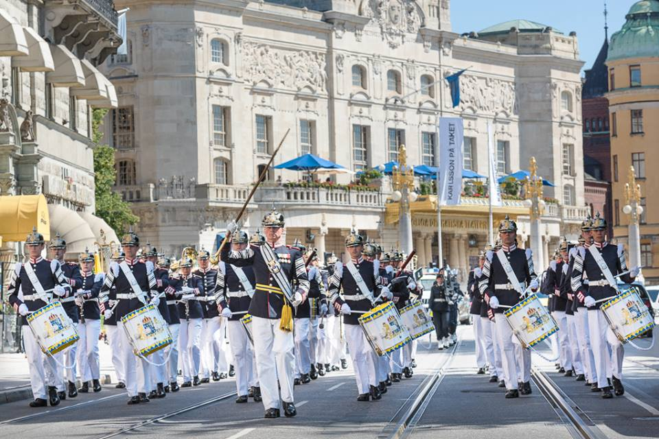 Arméns Musikkår vaktparad Hamngatan